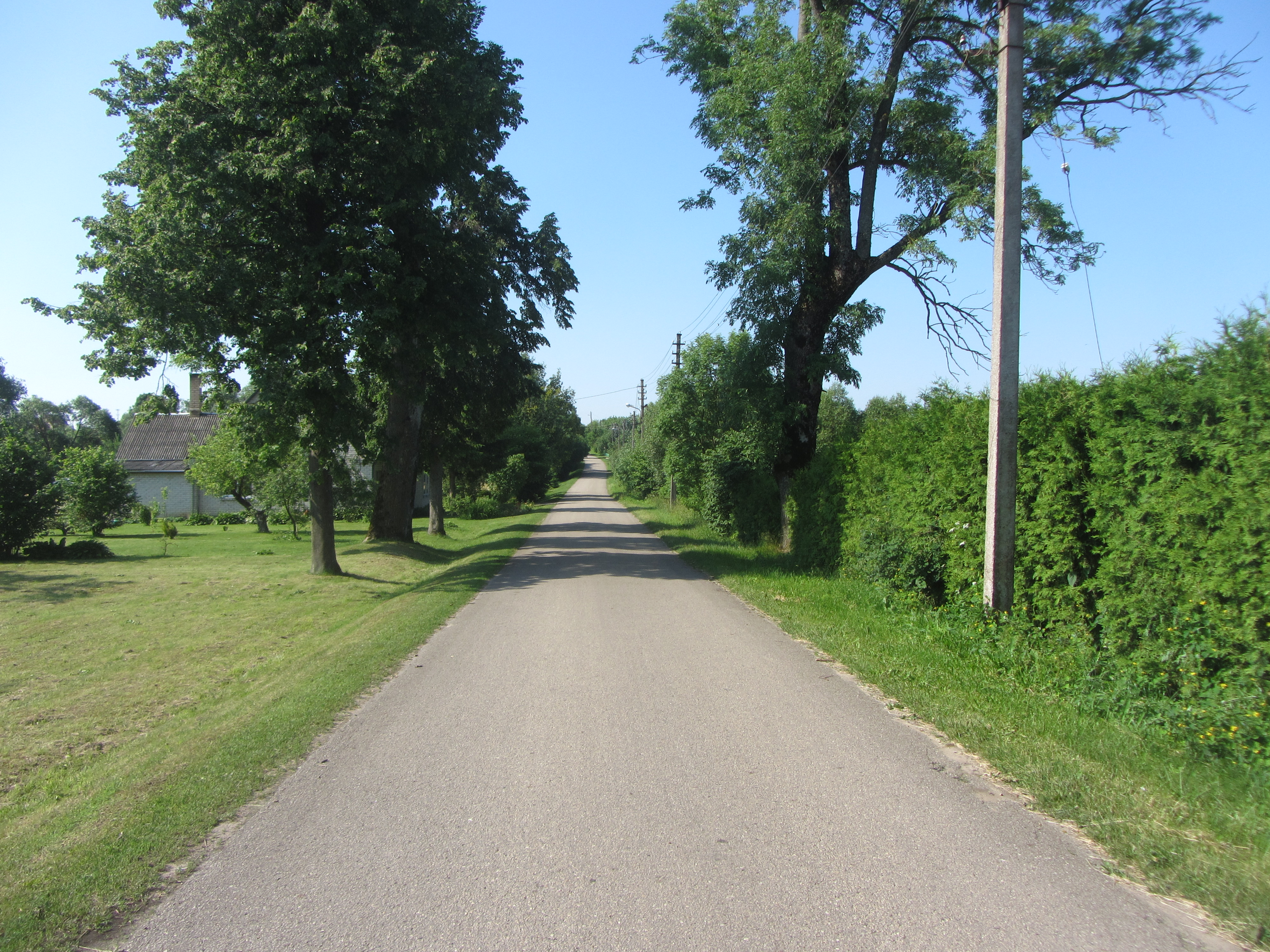 Jieznas, Lithuania